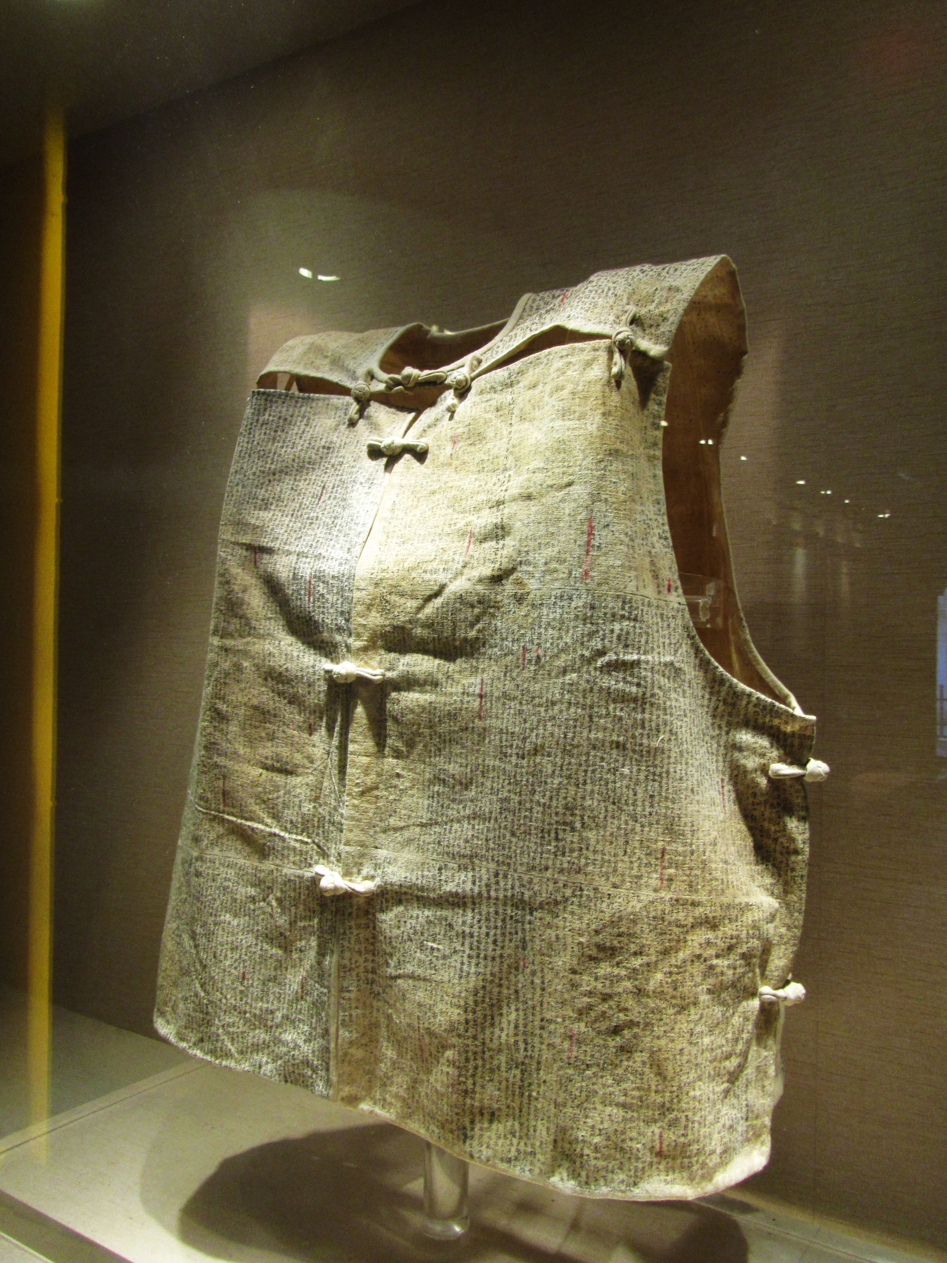 清代麻布坎肩夹带，高50厘米，宽55厘米，嘉定文庙藏。